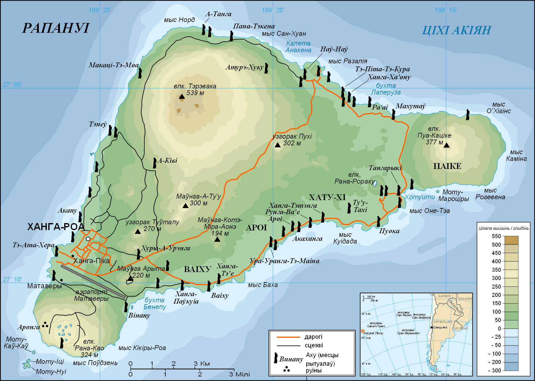 Карта Рапануі